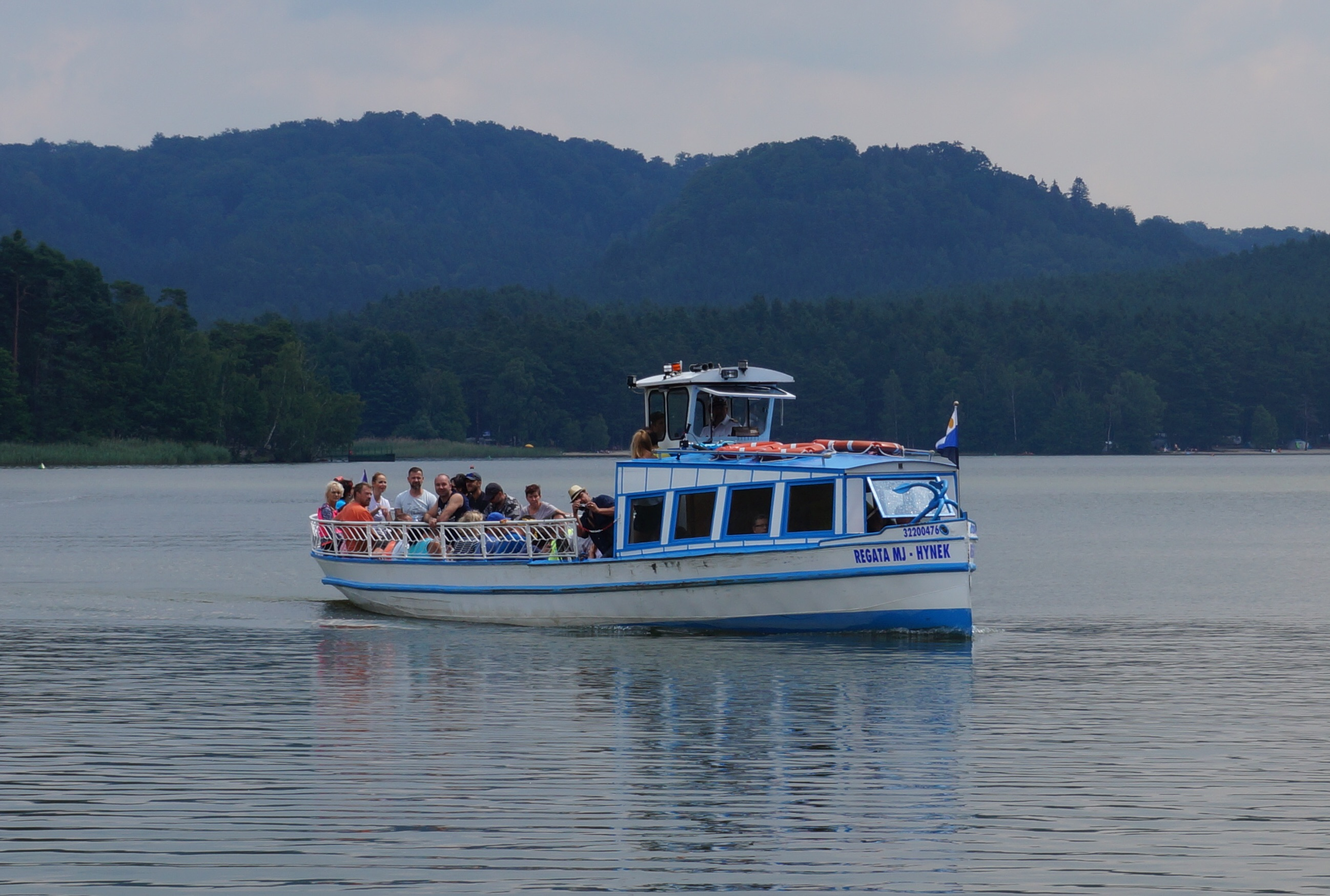 Motorová loď Hynek v jíždí do přístaviště ve Starých Splavech, červenec 2017.